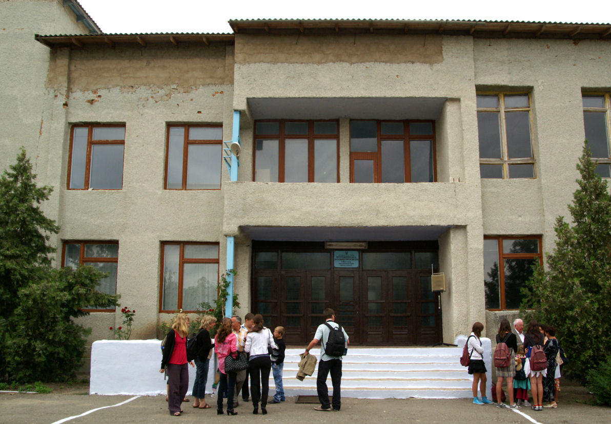 Schule in Wessela Dolyna (Tarutyne)